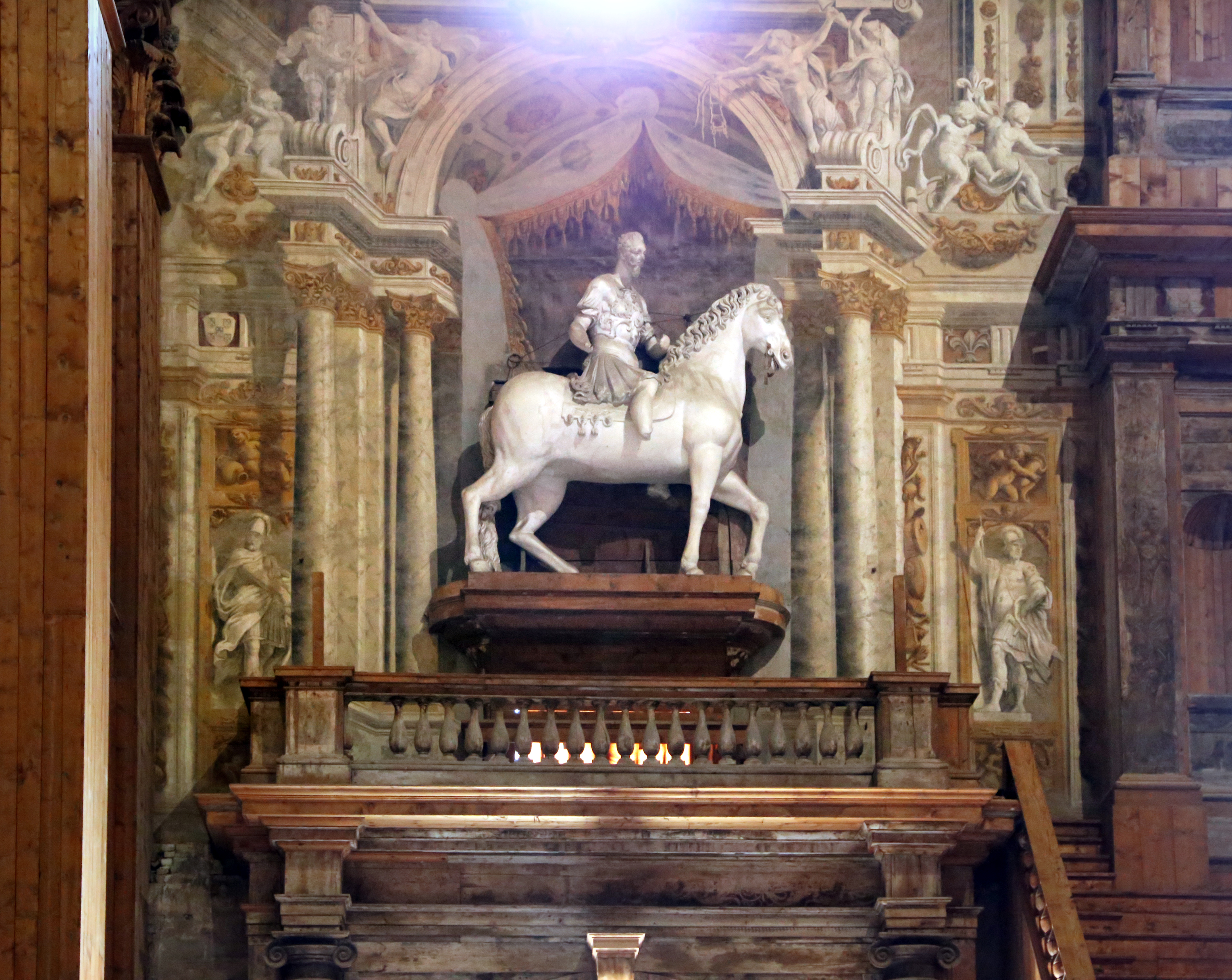 Teatro Farnese This is a photo of a monument which is part of cultural heritage of Italy.